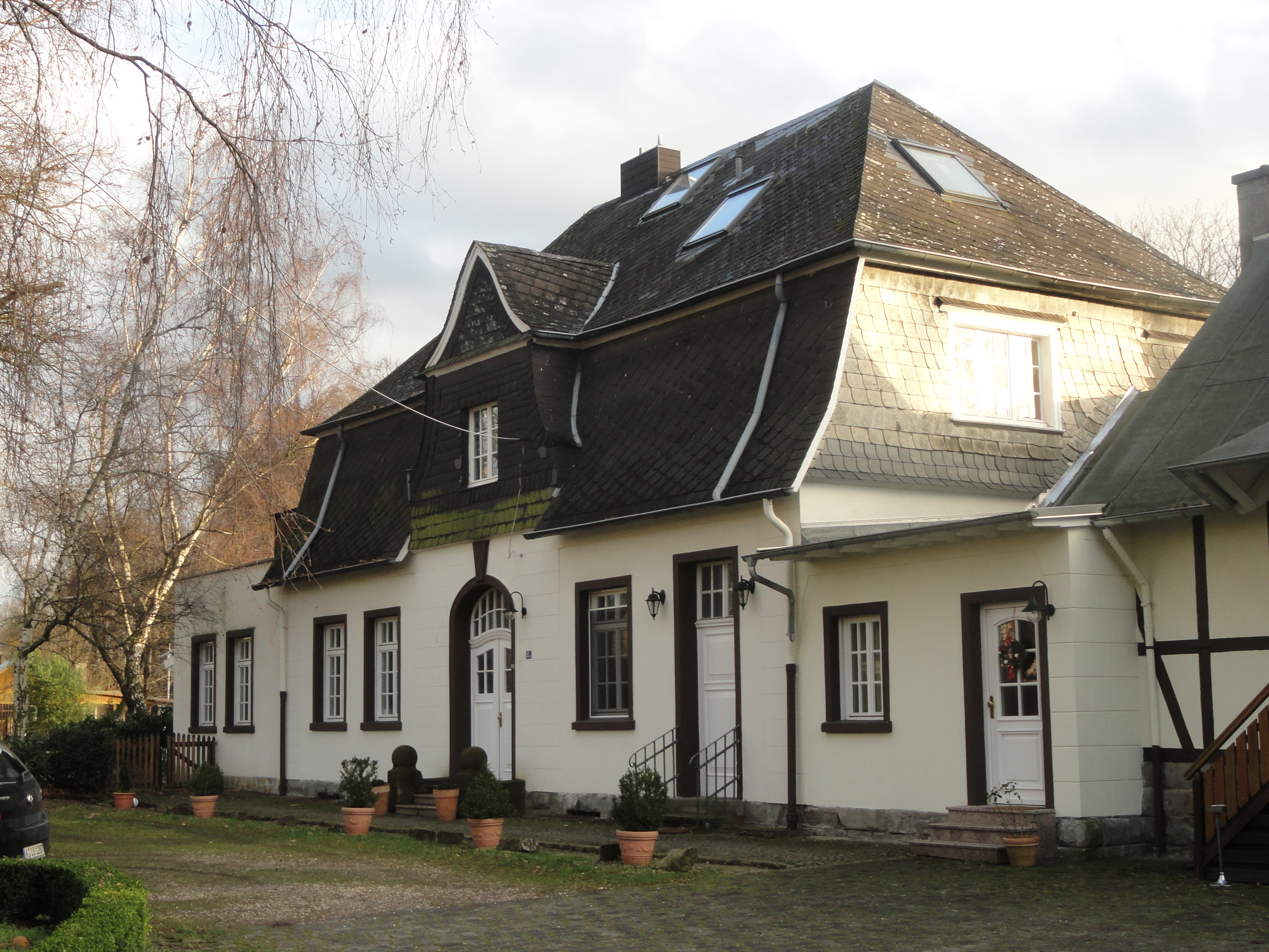 ehem. Bahnhof Rath-Heumar This is a photograph of an architectural monument.